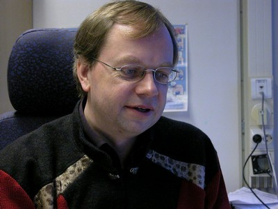 O químico norueguês Kenneth Ruud